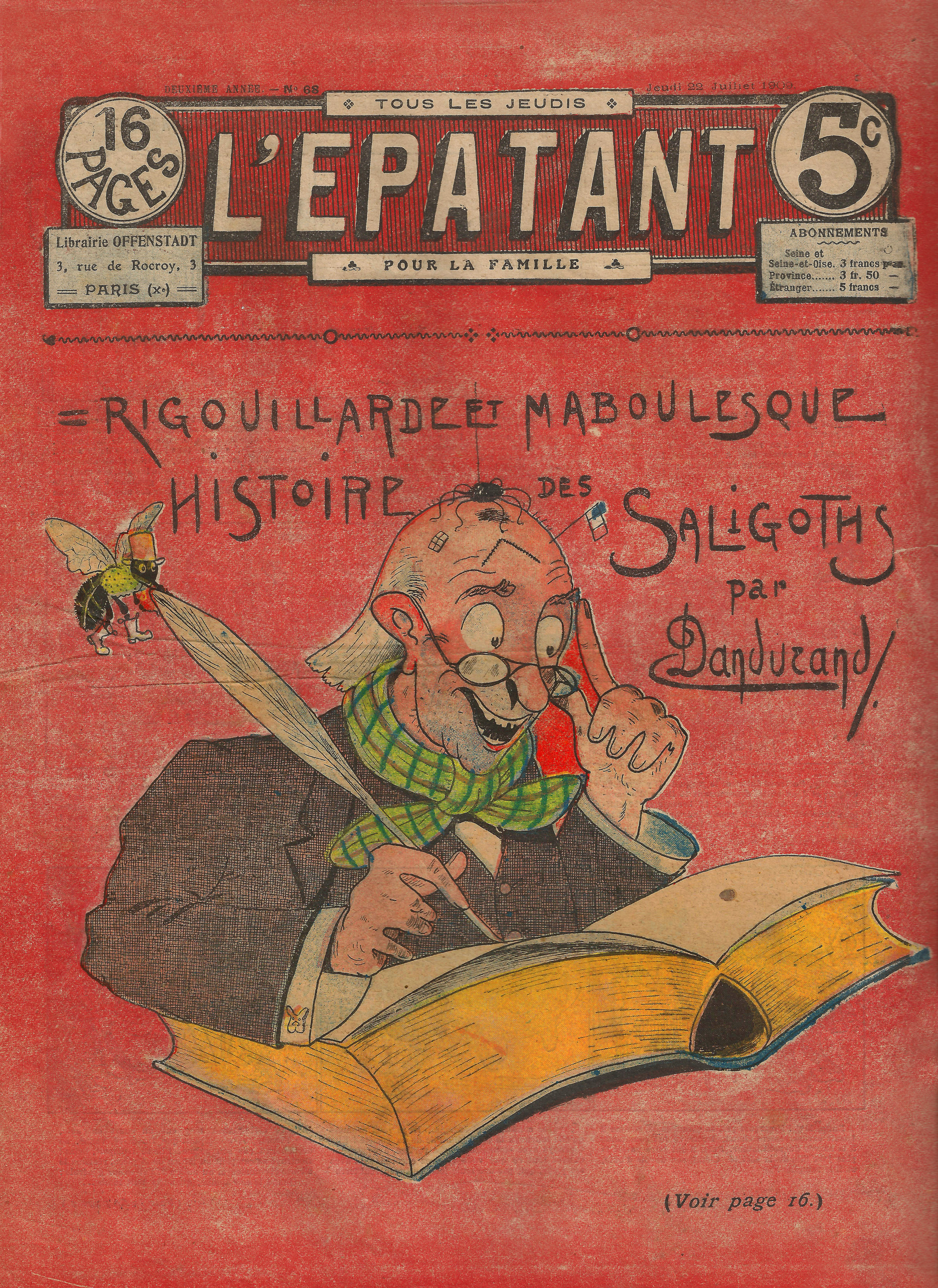 L'Epatant, hebdomadaire humoristique français, n° 68, 2e année, jeudi 22 juillet 1909